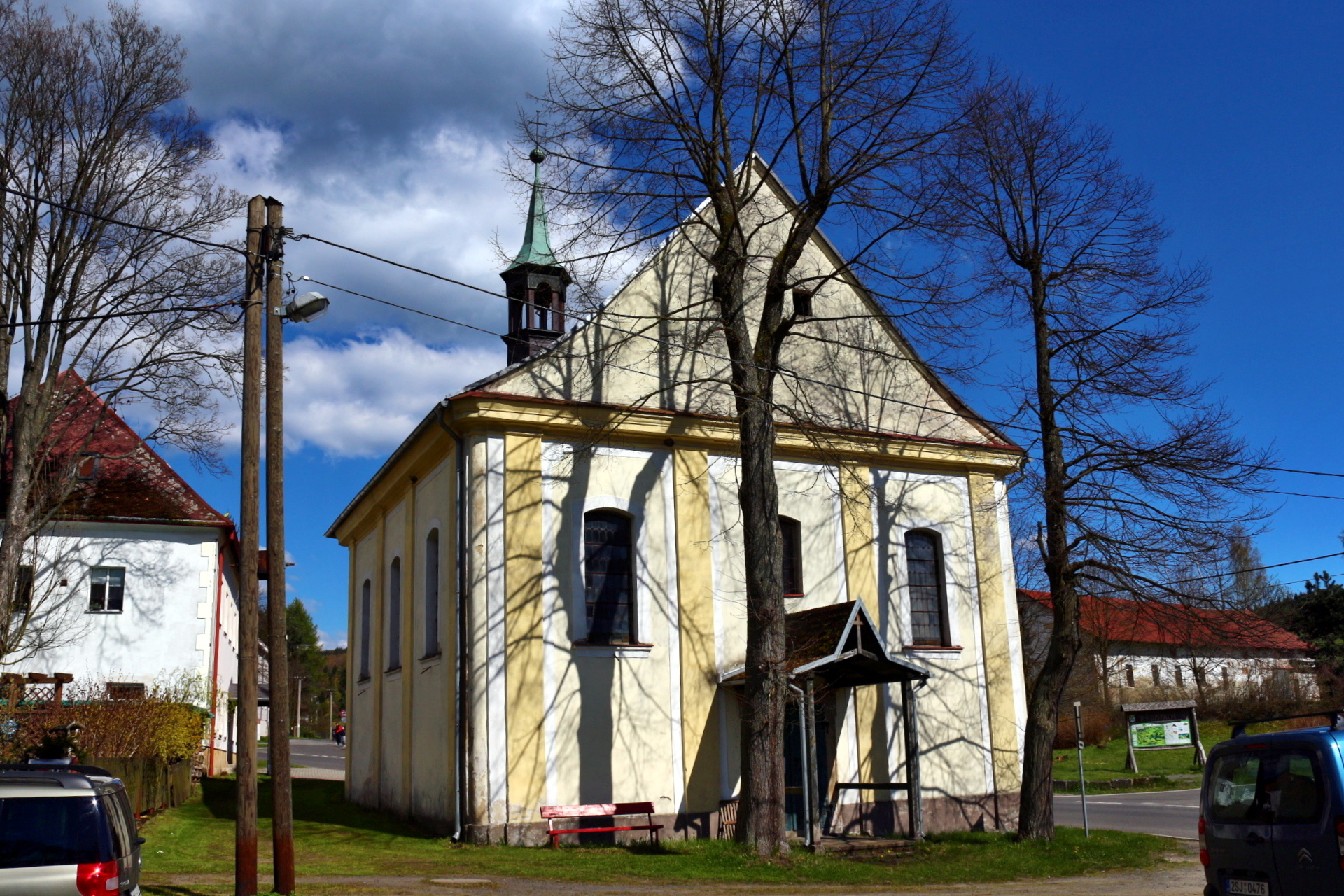 Kostel 14 Sv. pomocníků v Krompachu